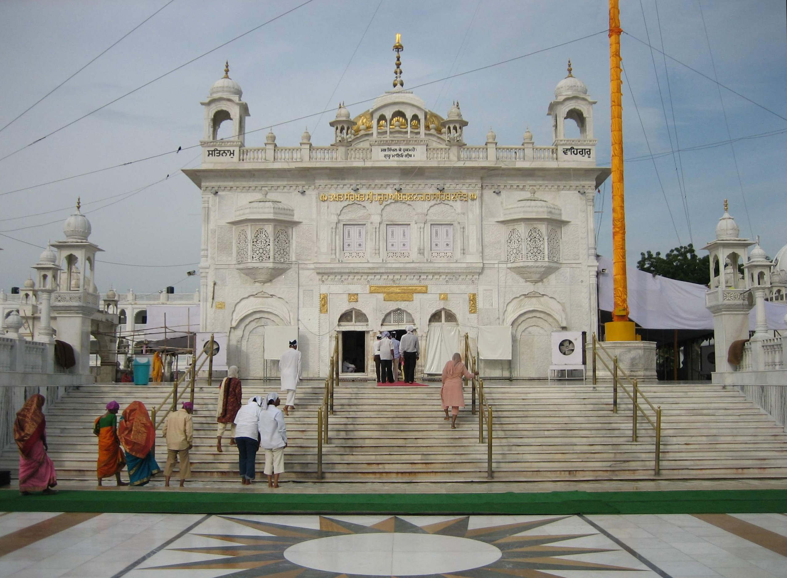 Takht Shri Hazoor Sahib Gurudwara Nanded